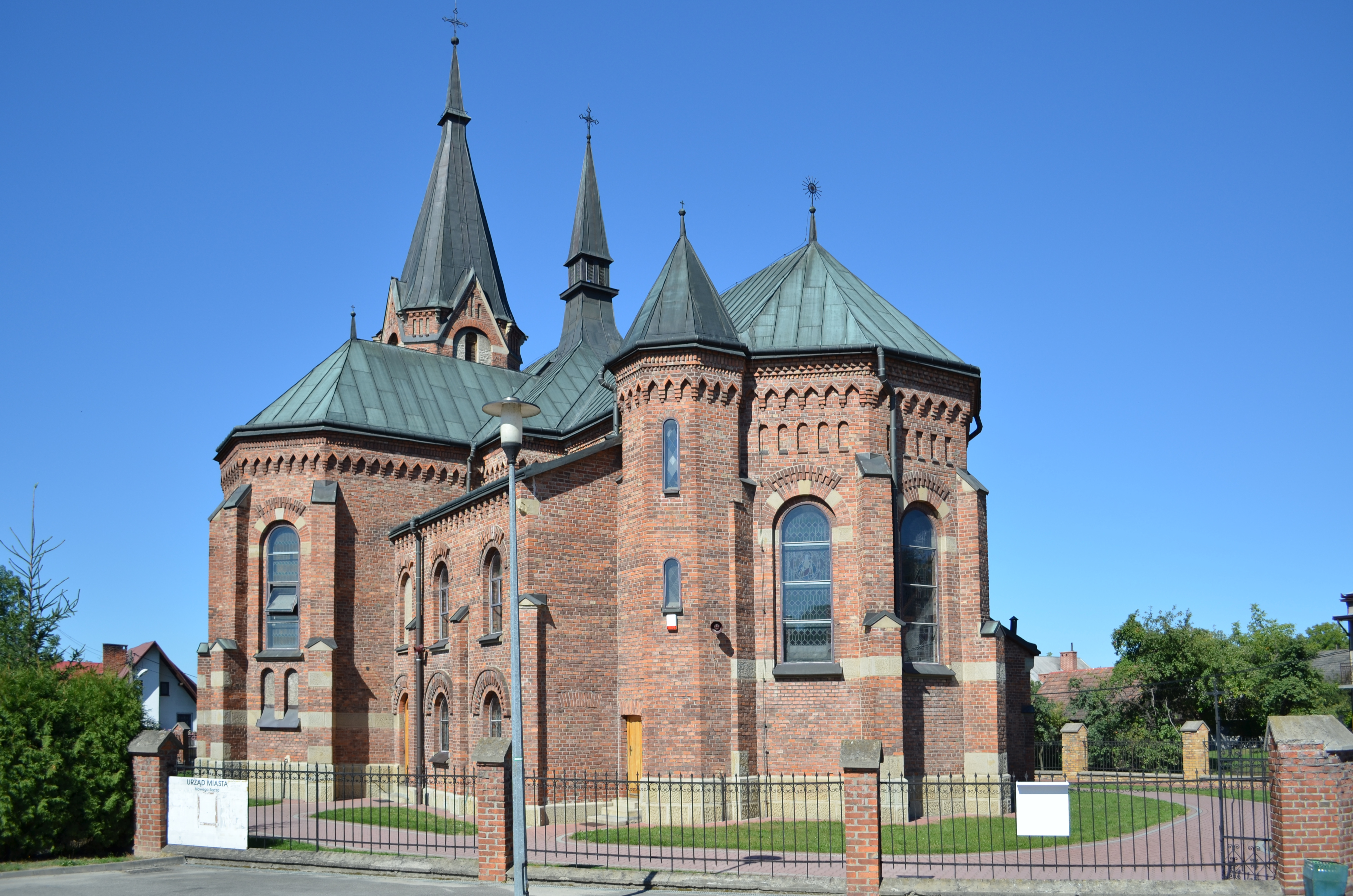 Nowy Sącz, kościół par. p.w. św. Wawrzyńca, 1906-1909